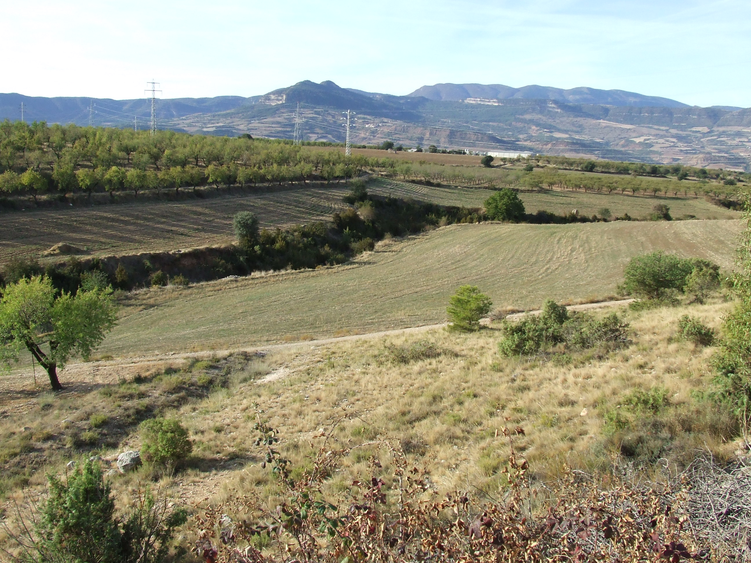 El Barranc del Mas de Mitjà (Abella de la Conca, Pallars Jussà)